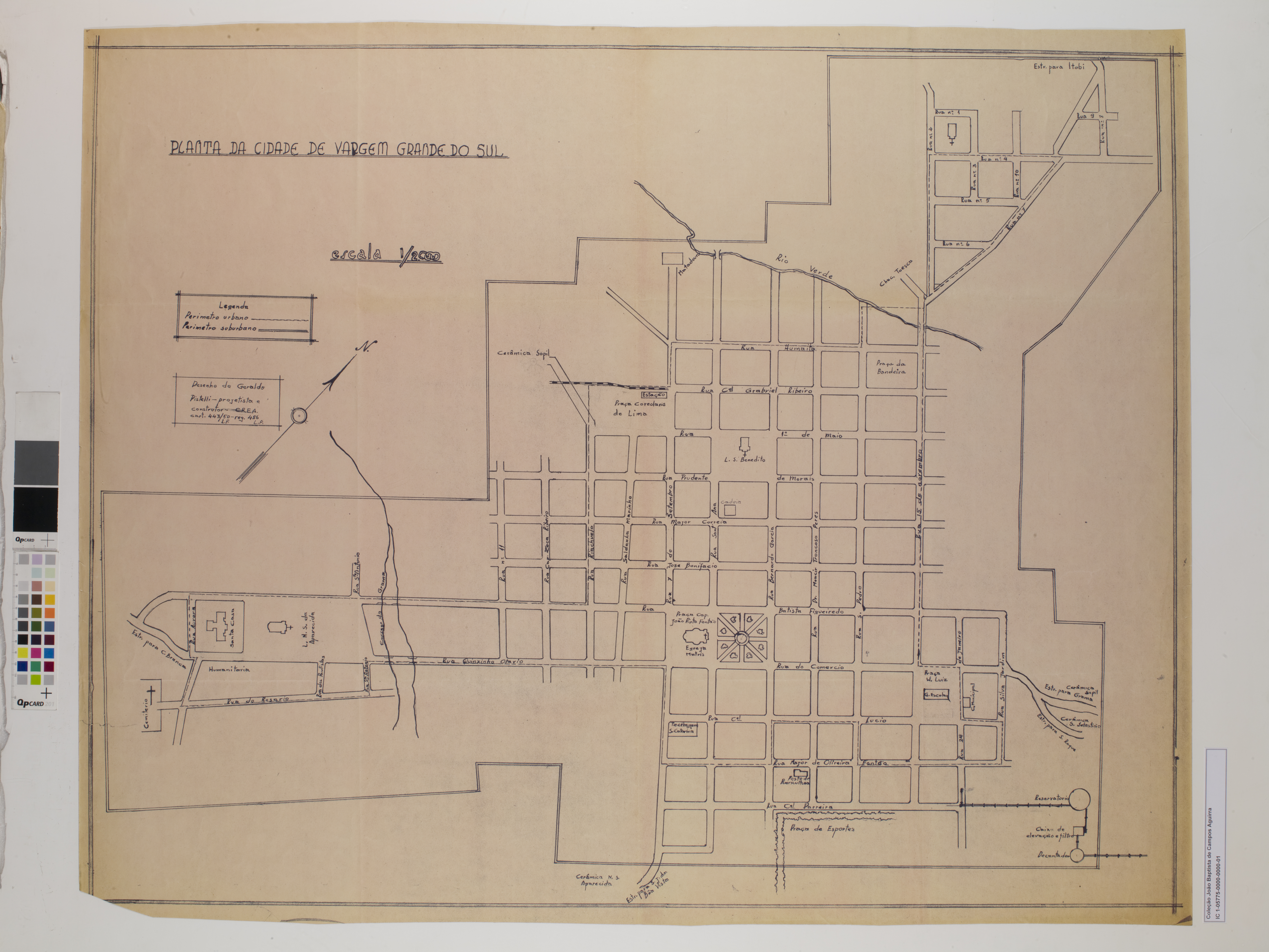 Obra que integra o acervo do Museu Paulista da USP. Coleção João Baptista de Campos Aguirra